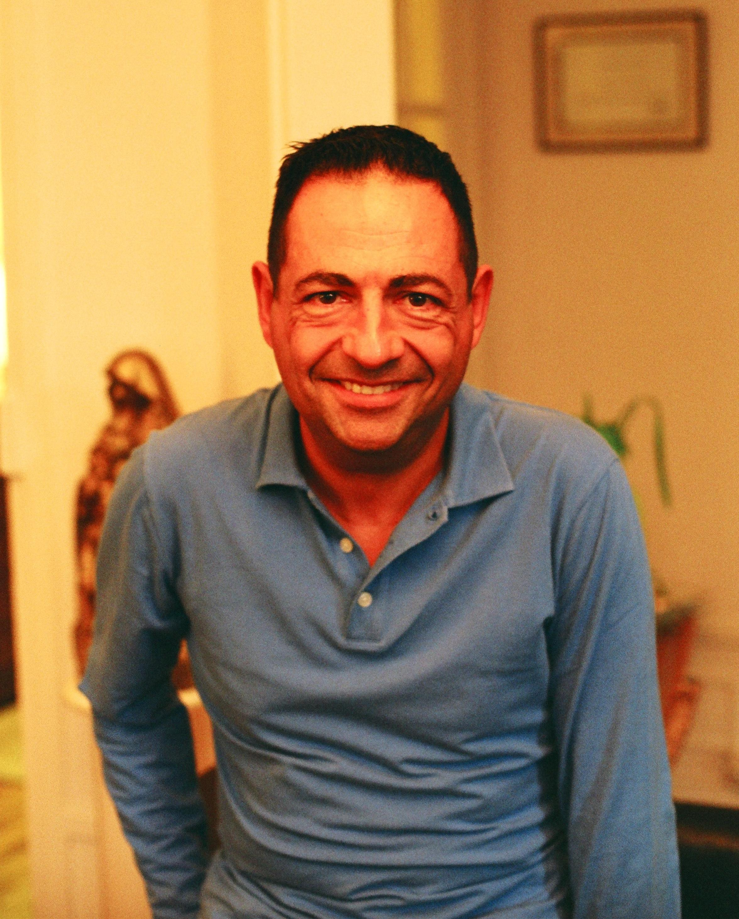 Jean-Luc Roméro à son bureau à Paris